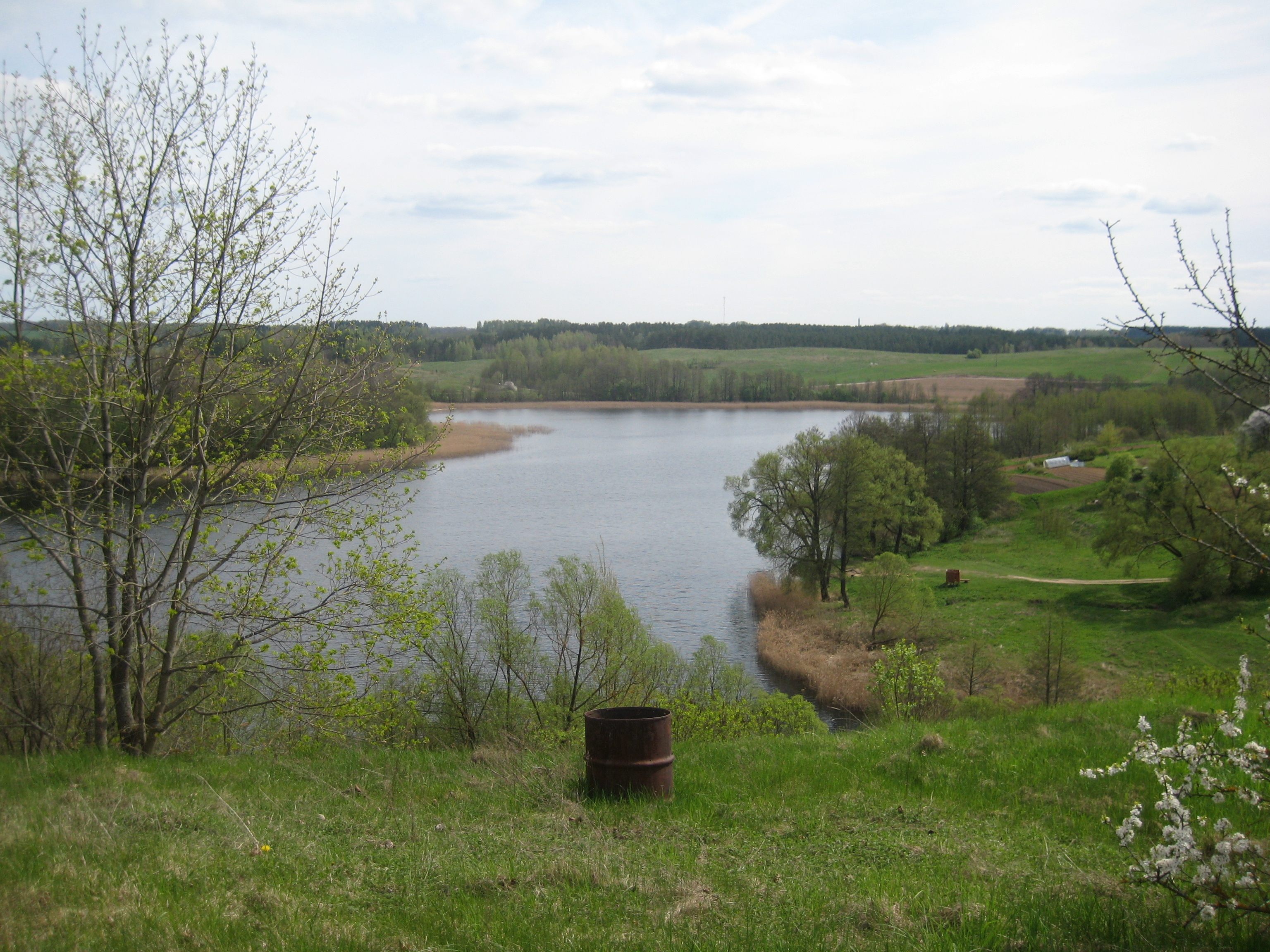 Zarasai, Lithuania